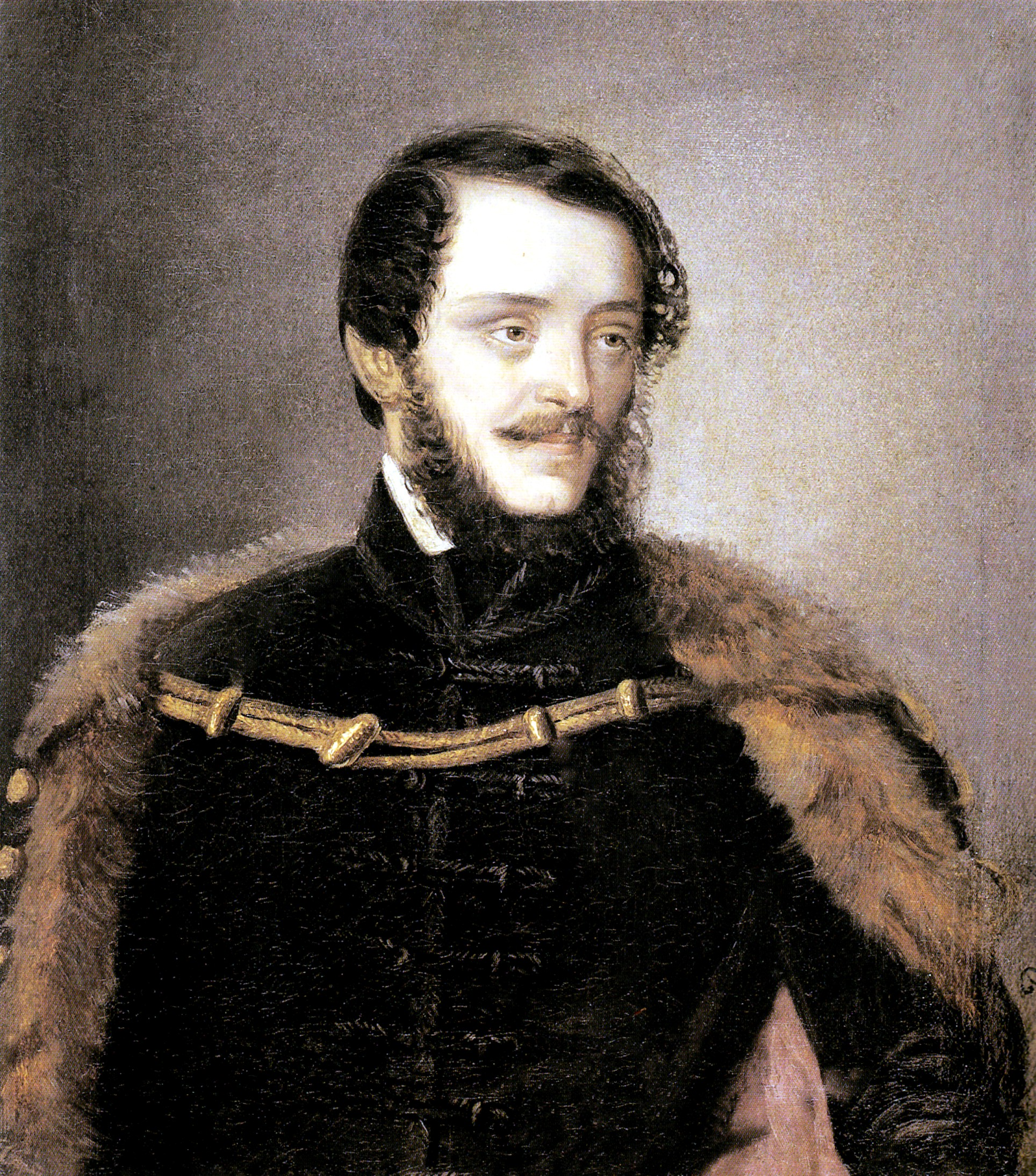 Kossuth Lajos